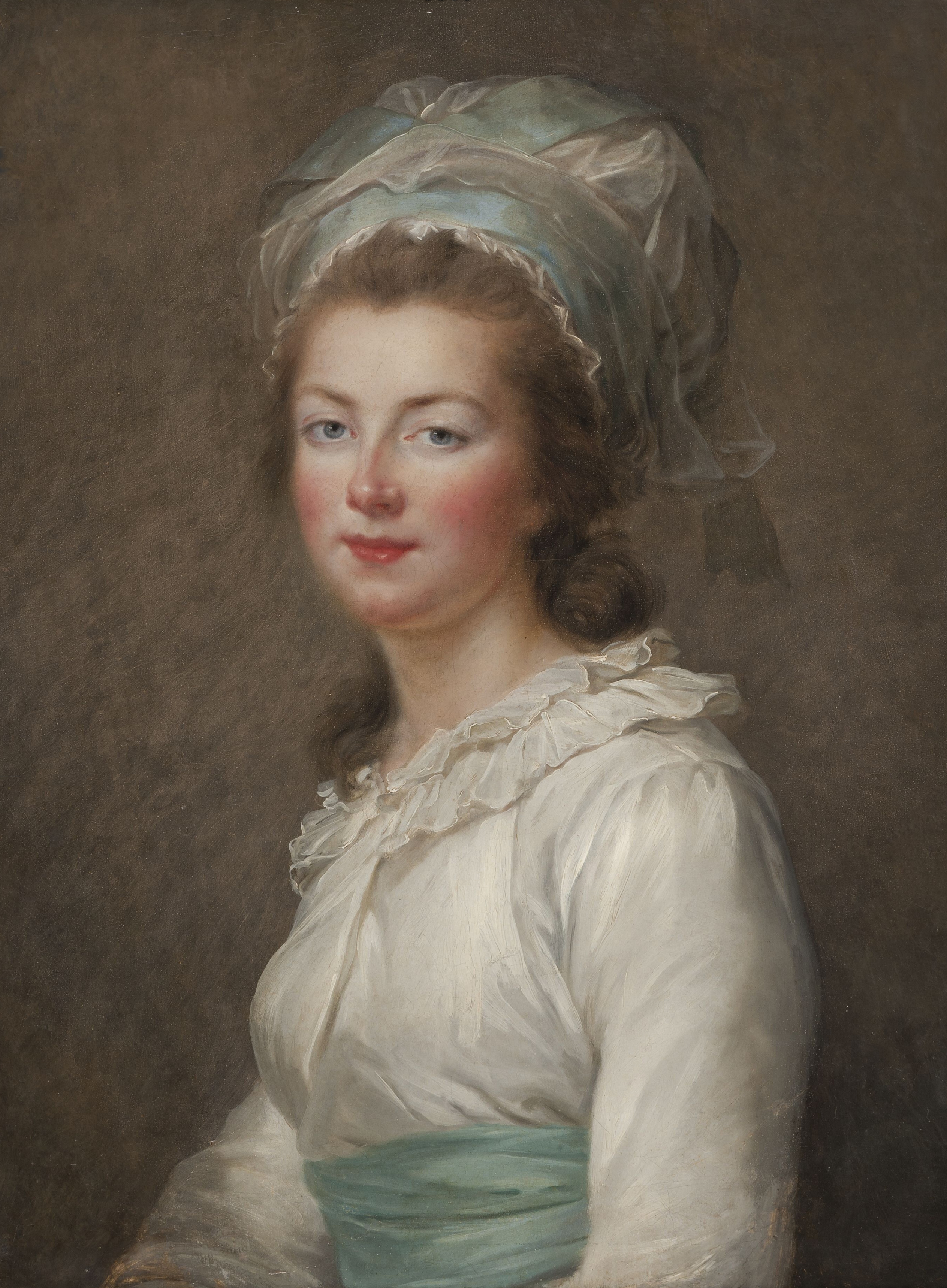 Élisabeth Philippine Marie Hélène von Frankreich, genannt Madame Élisabeth, war eine französische Prinzessin. Sie war die Schwester der Könige Ludwig XVI., Ludwig XVIII. und Karl X. von Frankreich.